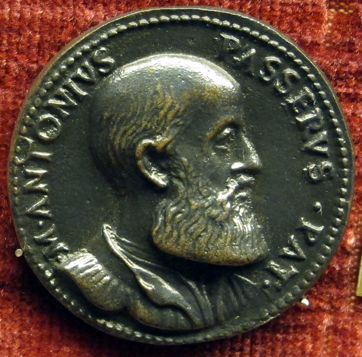 Medaglia di Marcantonio Passeri